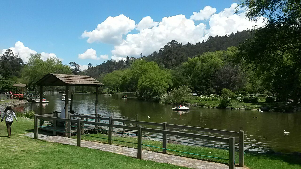 Laguna del parque El Paraíso, Cuenca - Ecuador